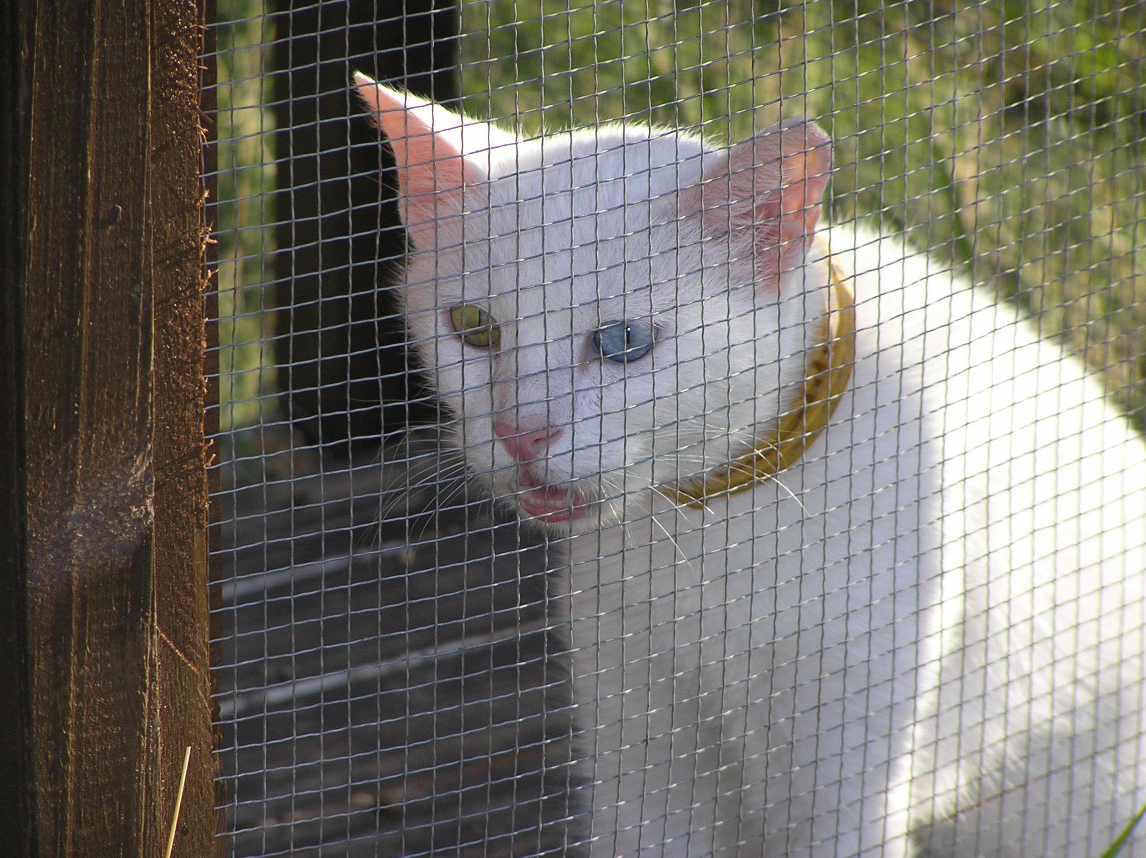 Van Cat